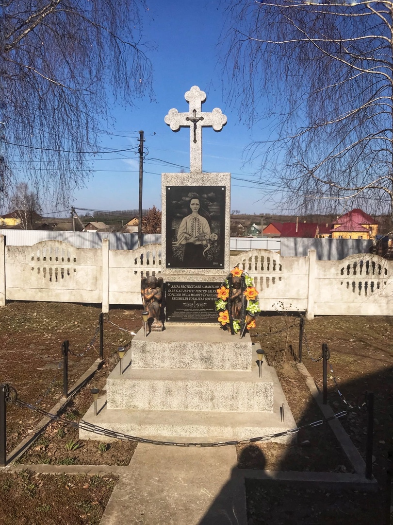 Памятник Защитное крыло матерей, они пожертвовали собой, чтобы спасти своих детей от смерти в ГУЛАГ-ерях в Cоветский тоталитарный режим